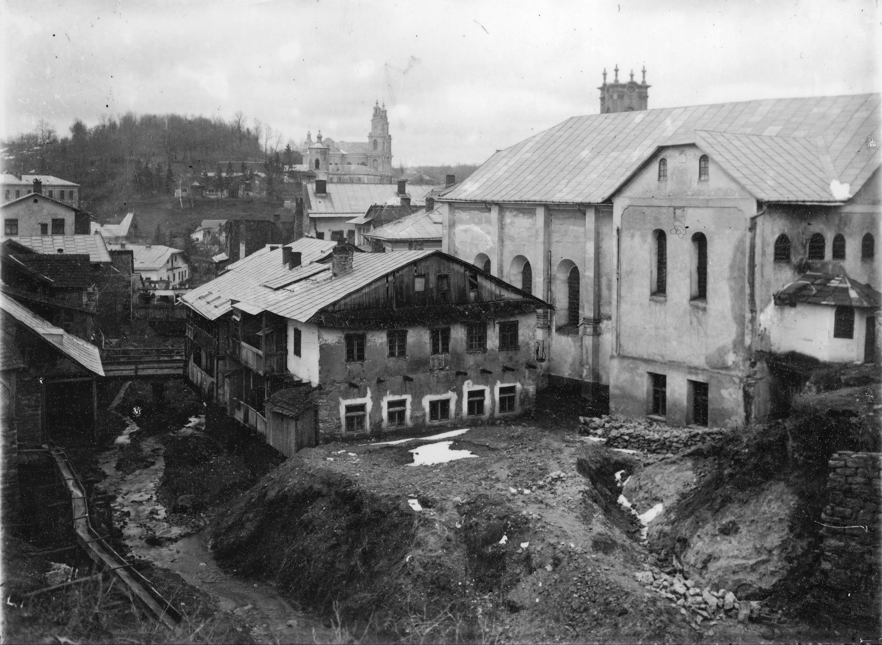 Велика синаґоґа, Бучач. Вигляд з теперішньої вул. Підгаєцької